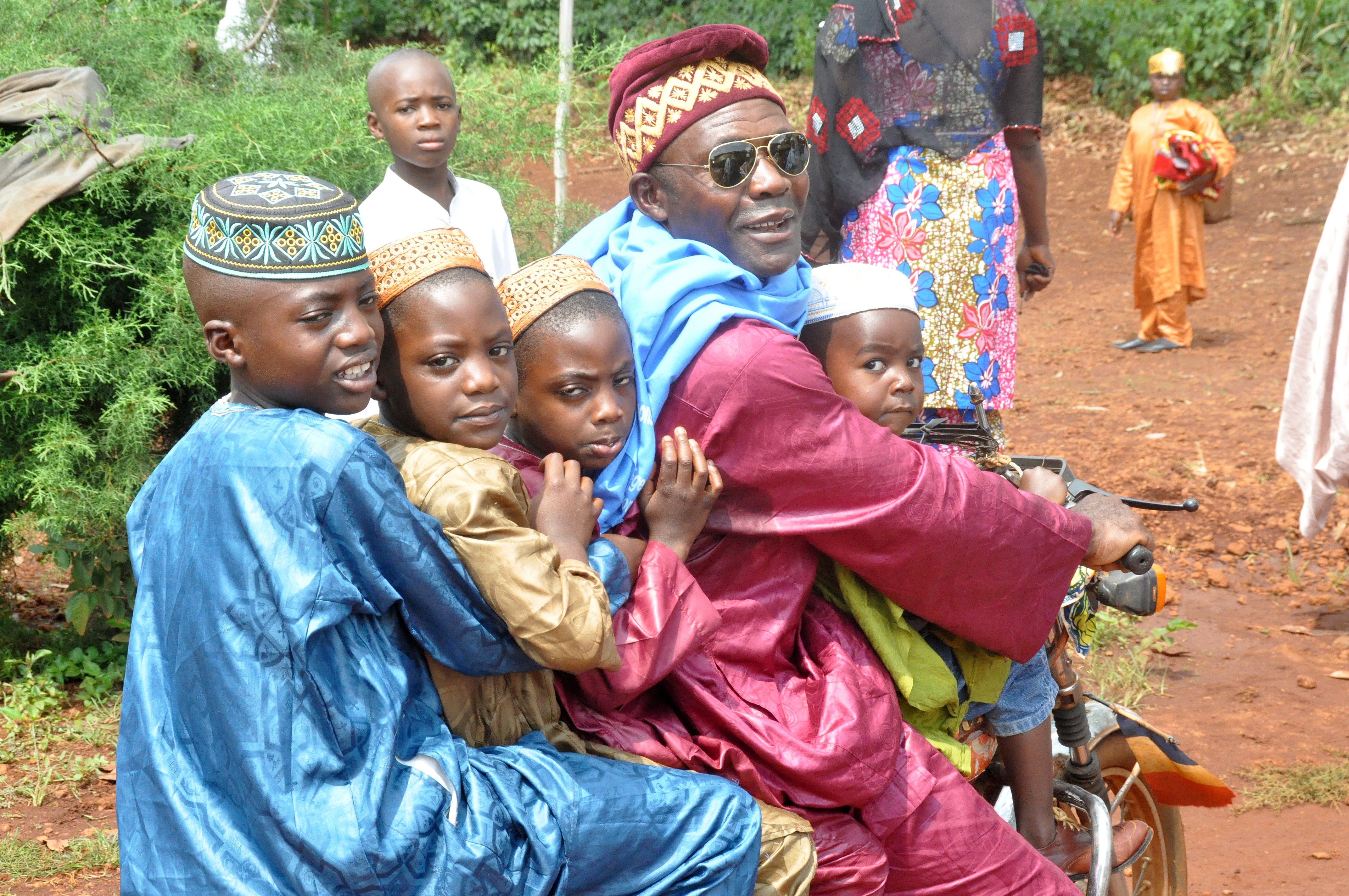 Transport moto lors d'un jour de fête à Foumban This is an image of Cultural Fashion or Adornment from Cameroon